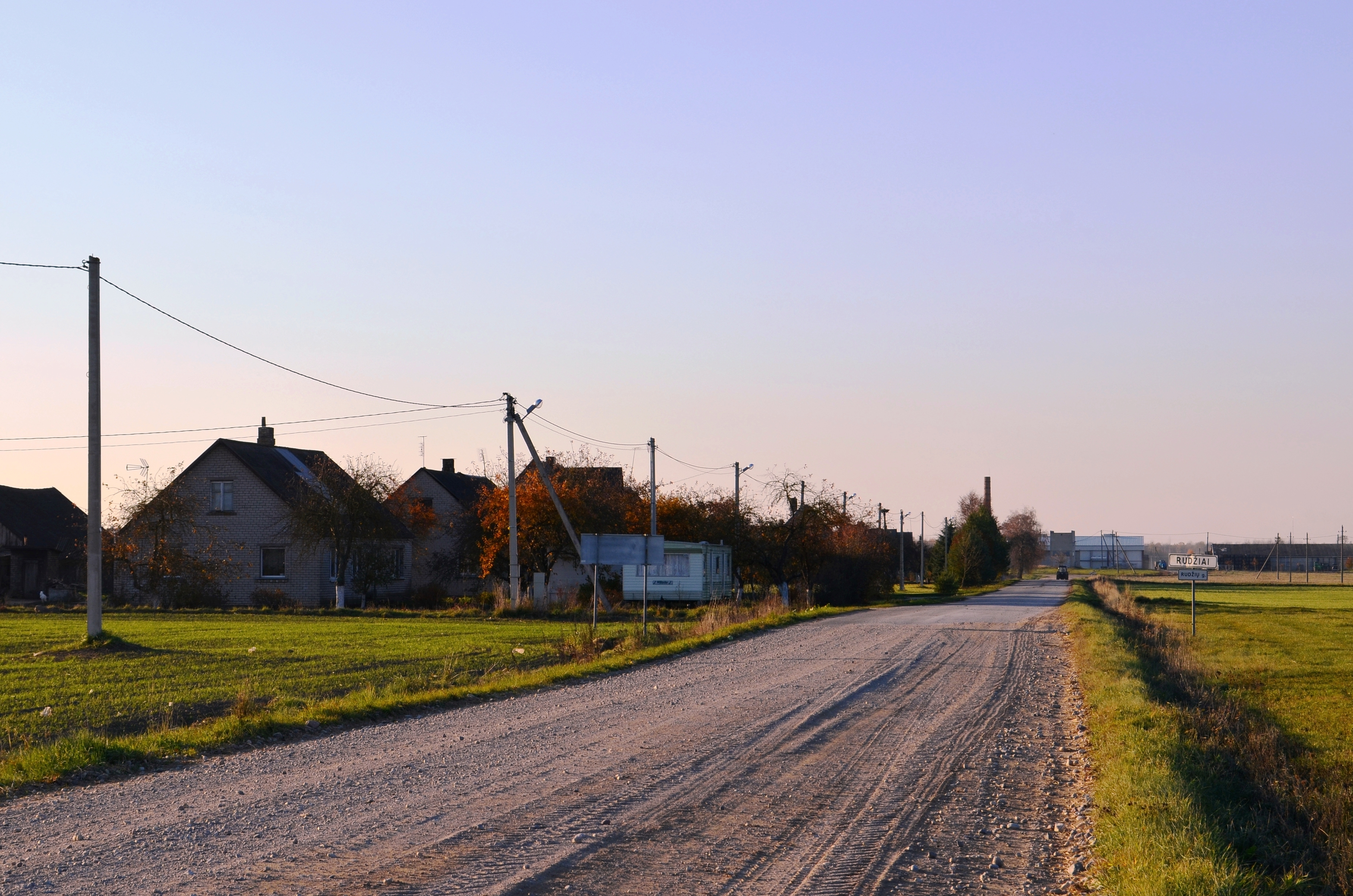 Rudžiai, Kėdainių raj.